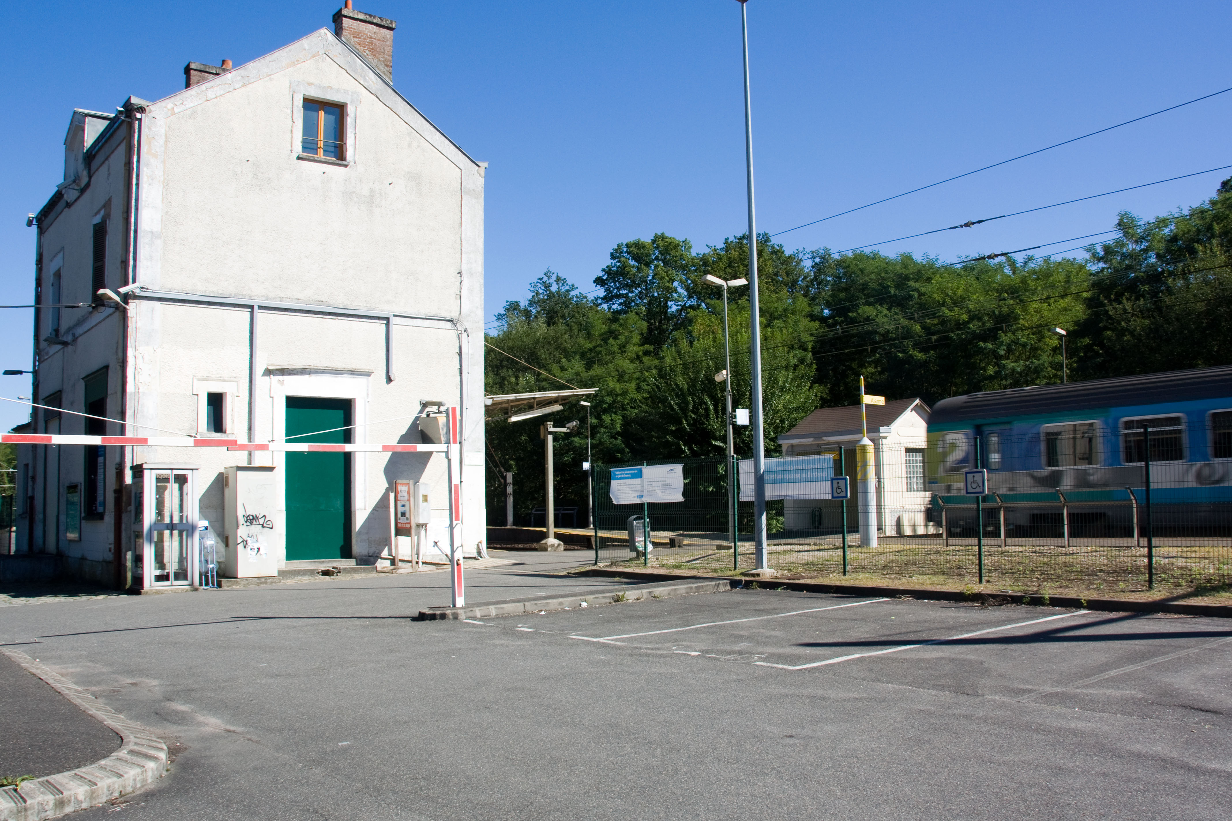 Gare de Thomery, Fontainebleau, Seine-et-Marne, France